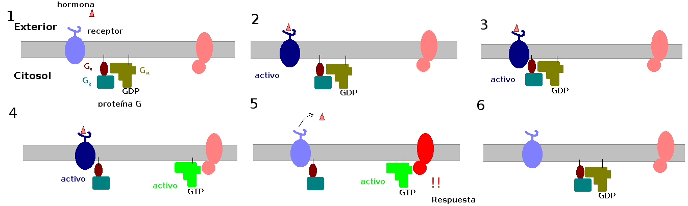 G Protein Activity Cycle; ciclo fisiológico del inicio de cascada de transducción de la señal mediada por un GPCR y una proteína G heterotrimérica. Para su explicación, véase